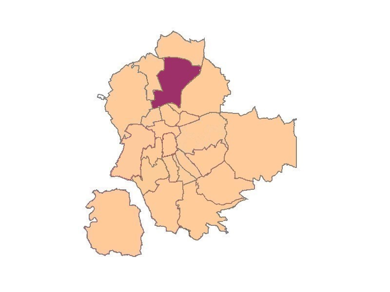 Plan de Saint-Etienne quartier de Carnot Le Marais